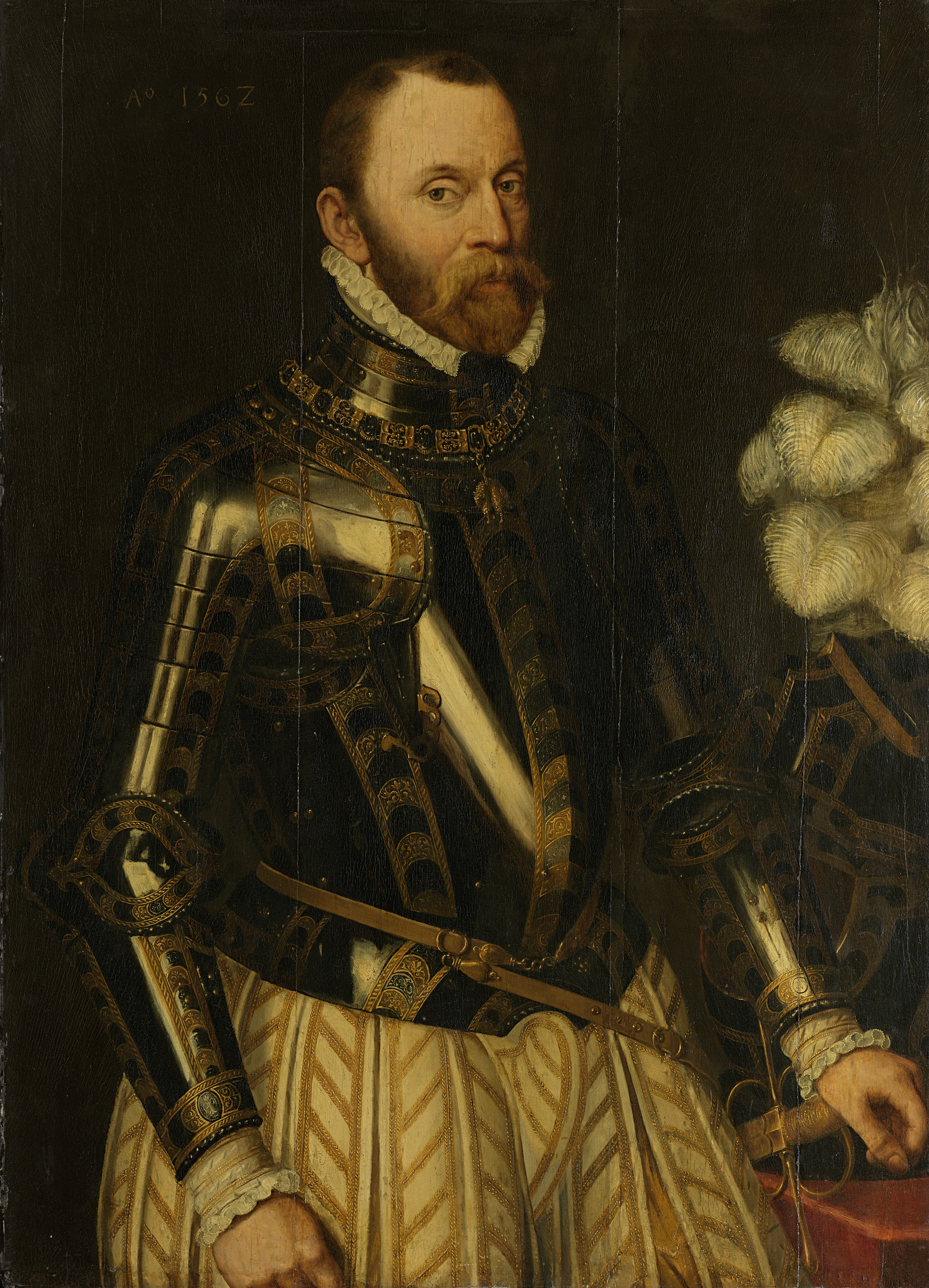 Portret van Filips van Montmorency, graaf van Hoorne, admiraal der Nederlanden en lid van de Raad van State. Heupstuk in wapenrusting, staande naar rechts, de helm met pluimen op een tafel aan de rechterzijde. De linkerhand op het gevest van het zwaard. Om de hals een gouden ketting met het embleem van de Orde van het Gulden Vlies.